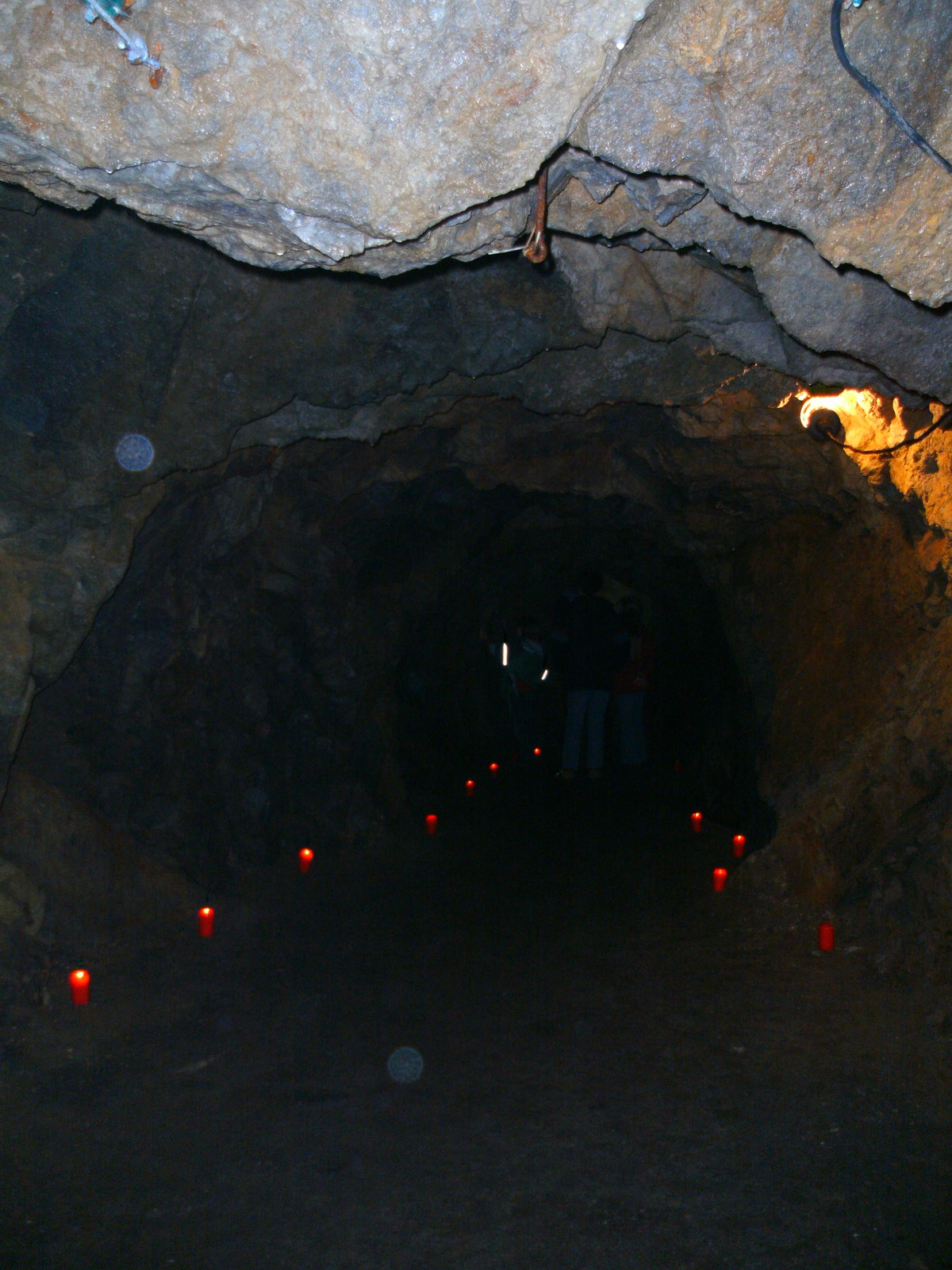 Gang unterhalb des Burghofes der Burg Stolberg